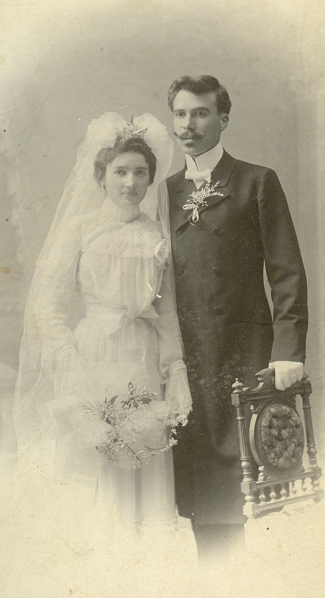 Евгения и Йордан Захариеви в деня на сватбата им. 1904